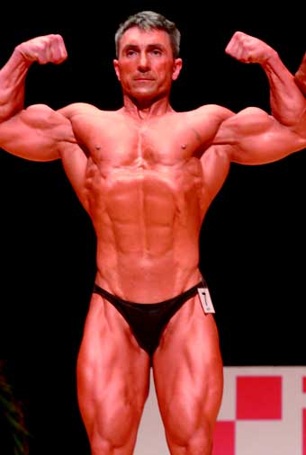 Carlos Fernández Mariño en el Campeonato de España AEFF (2011)